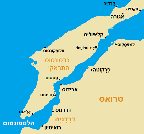 מפת הכרסונסוס התראקי, מקרא בעברית